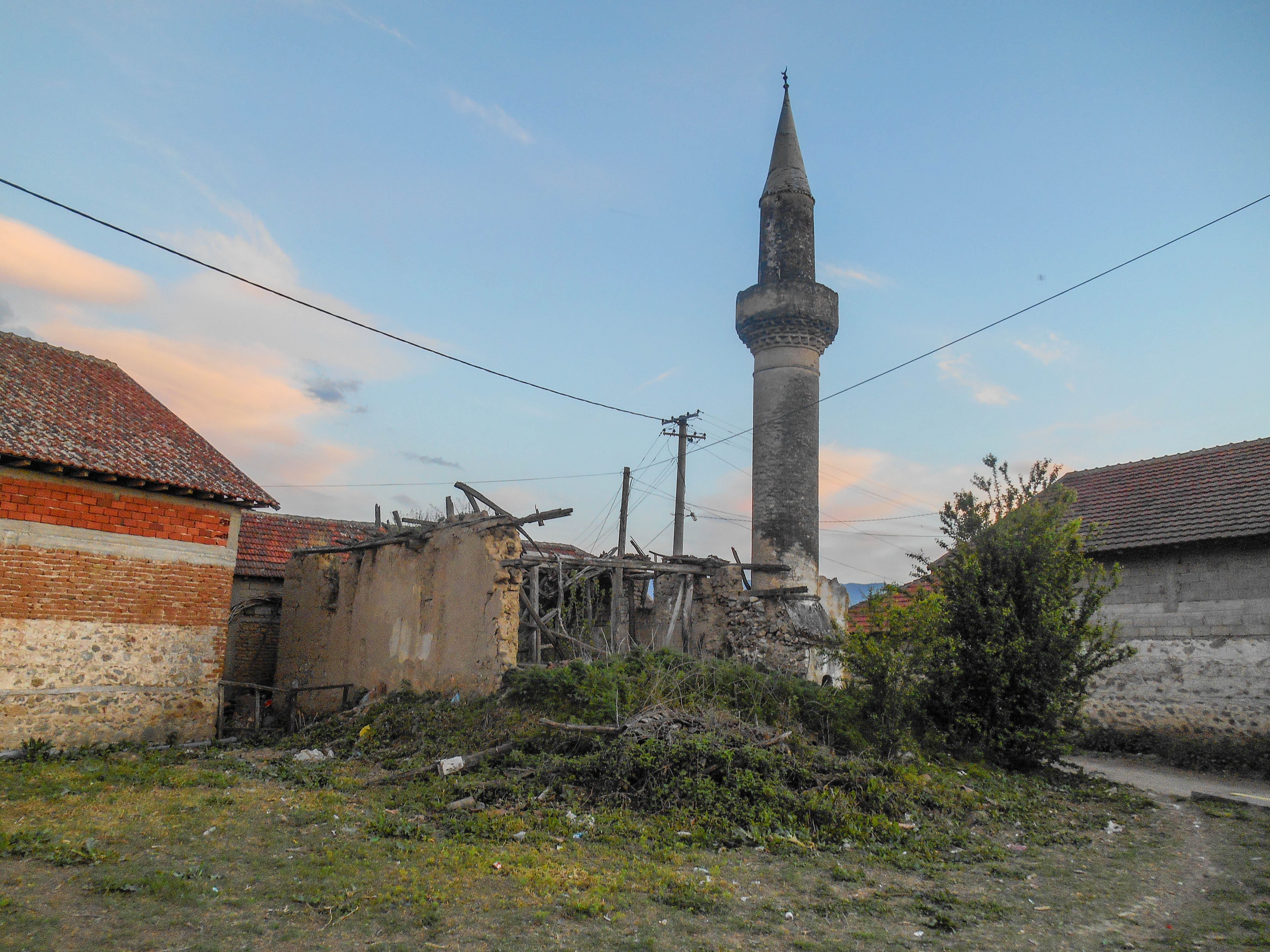 Џамија во Радово